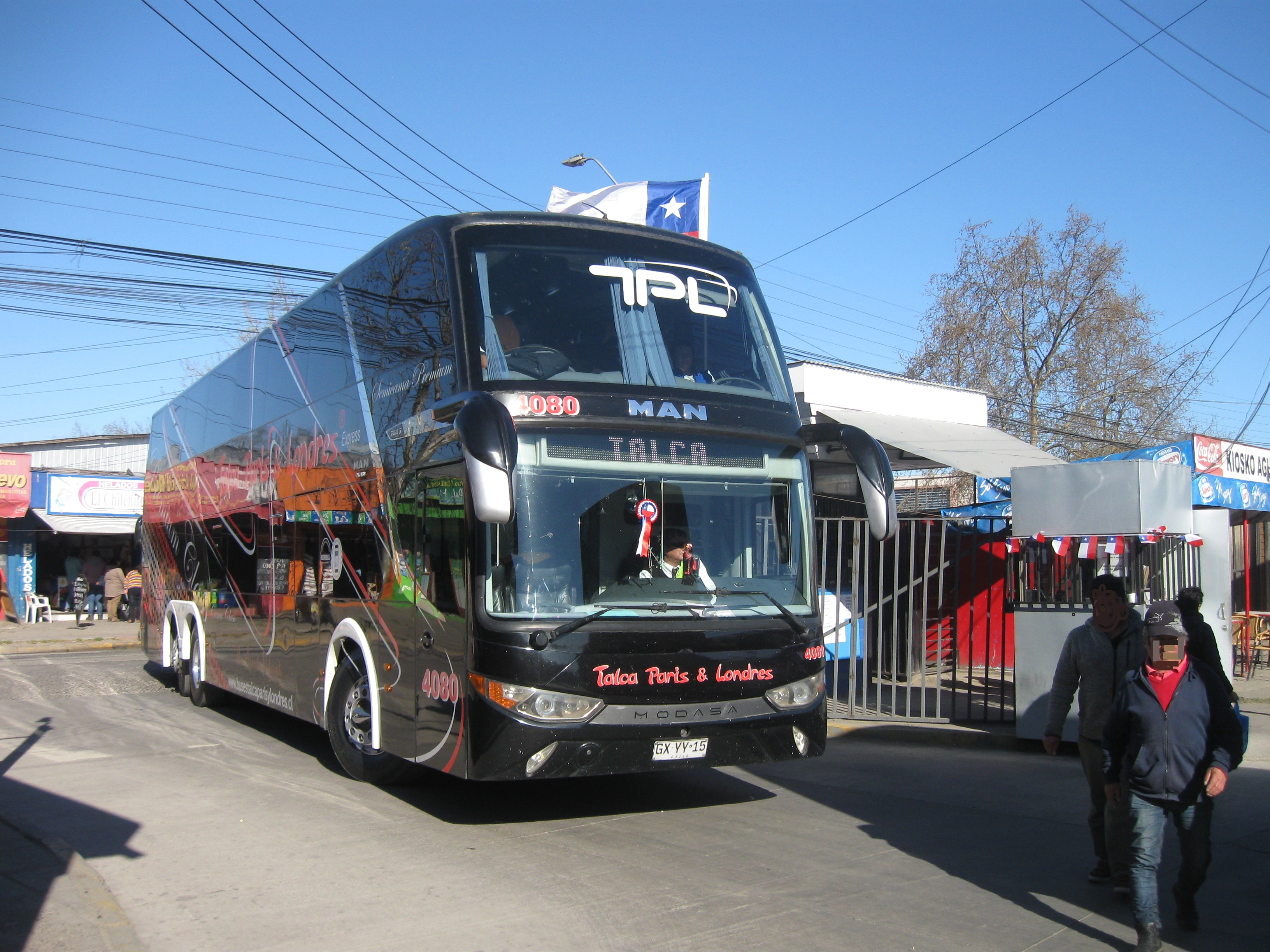 Bus cama de la línea "Talca París & Londres" entrando al terminal de Talca